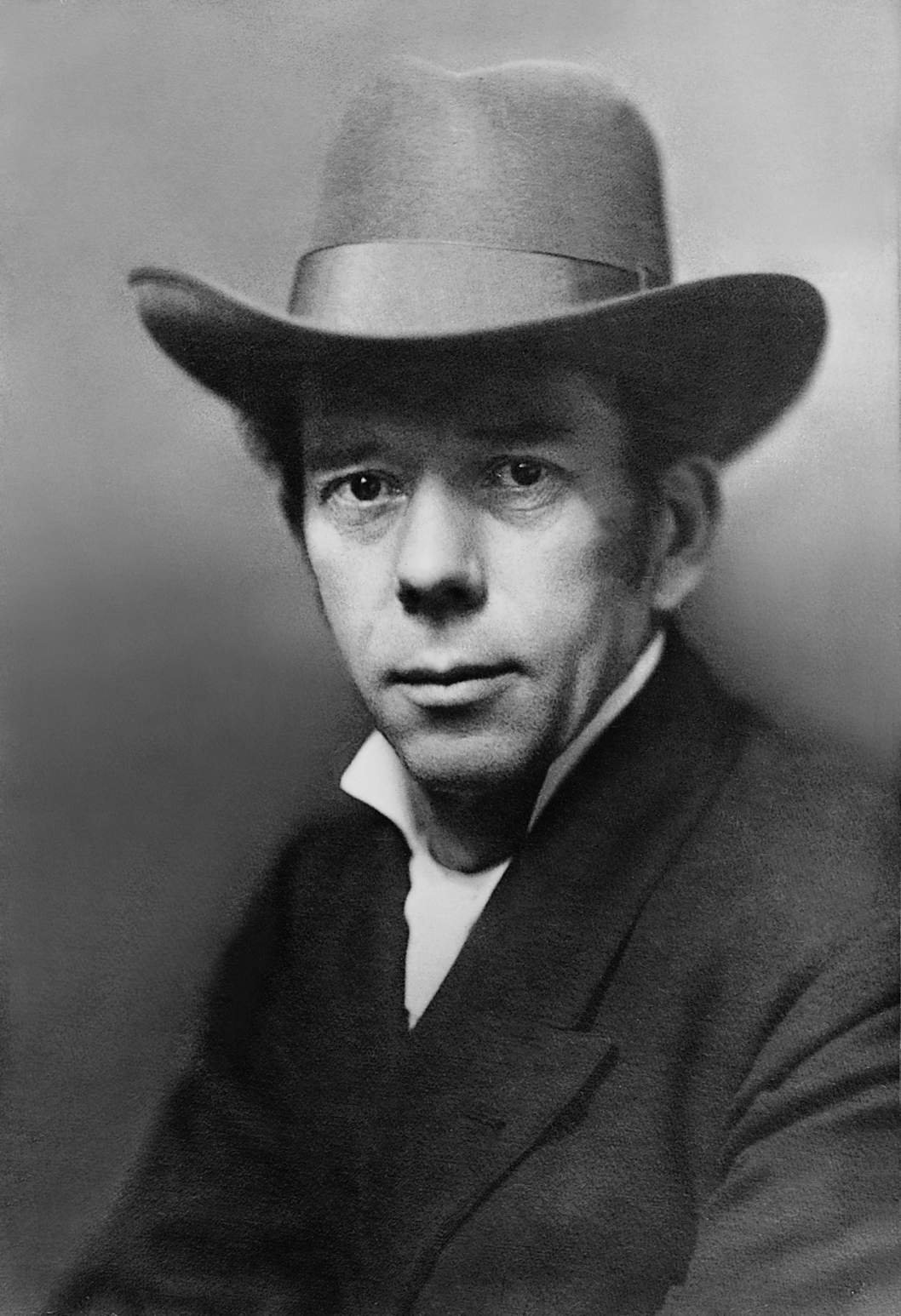 Szendy Árpád magyar zongoraművész és -tanár, zeneszerző.